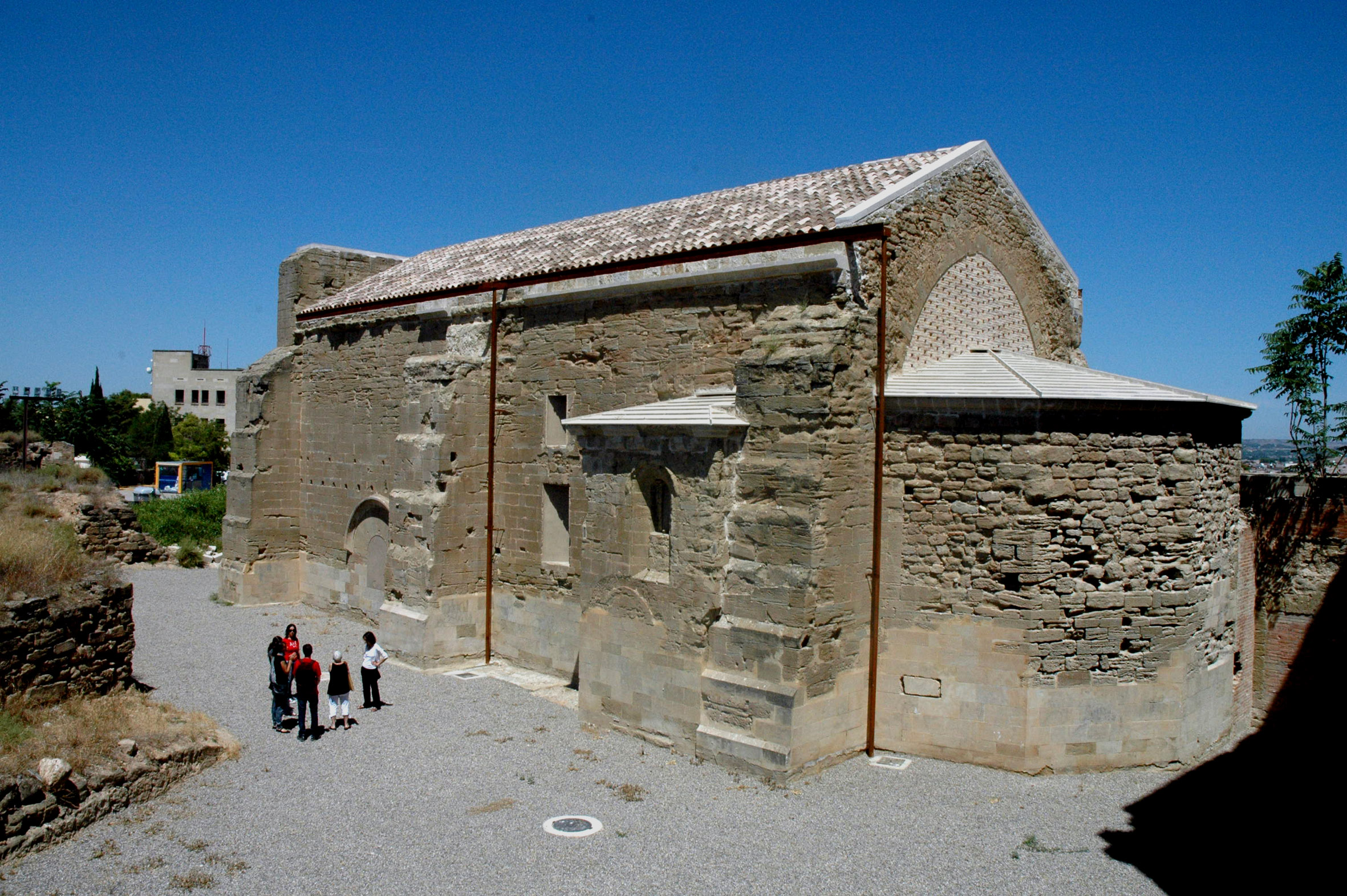 Castell templer de Gardeny, exterior de la capella conventual.